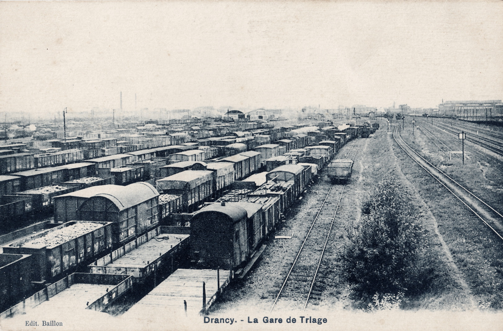 Carte postale ancienne éditée par Baillon : DRANCY - La Gare de Triage